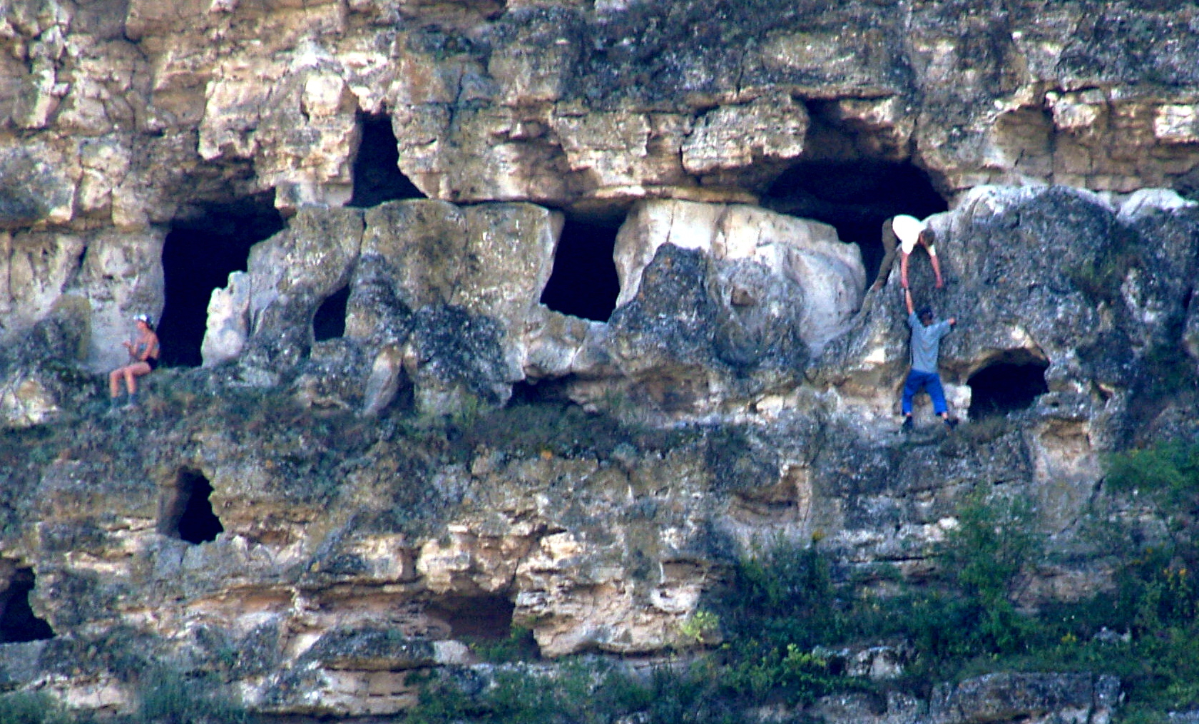 Orhei Vechi, Moldova